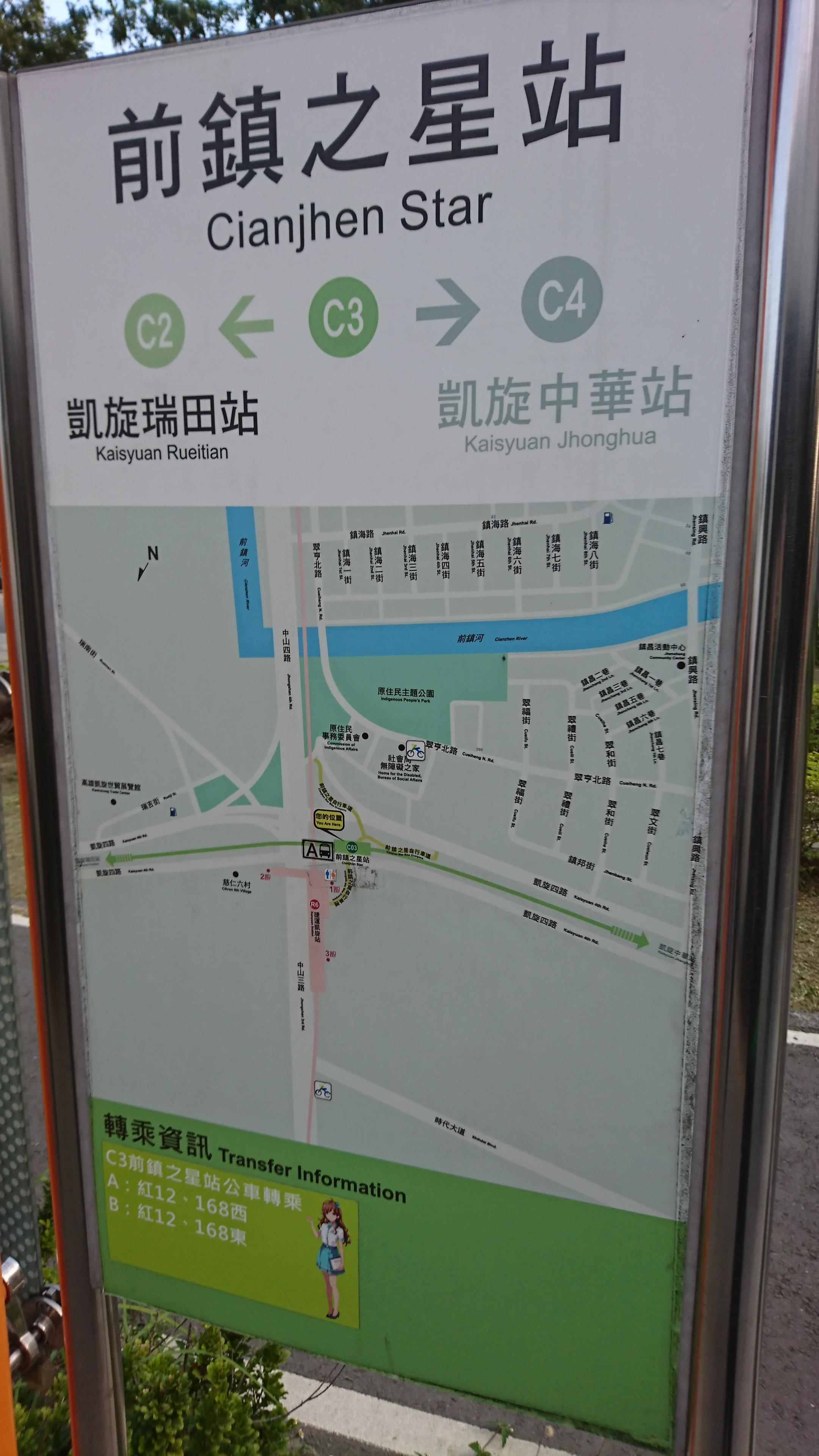 介紹凱旋站及前鎮之星站周圍景點。